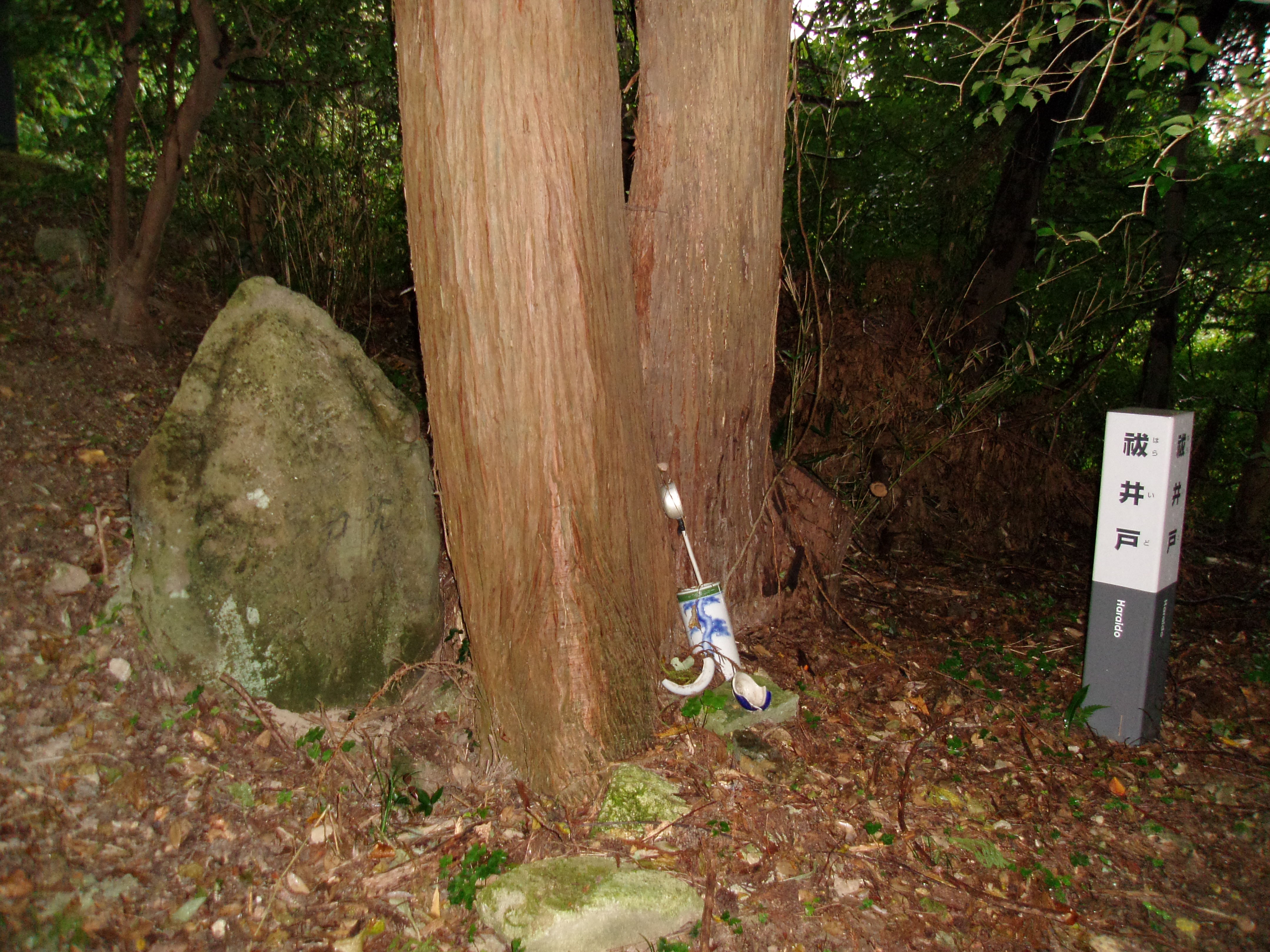 世界遺産「石見銀山」の構成資産である銀山街道鞆ヶ浦道 口屋峠の祓井戸